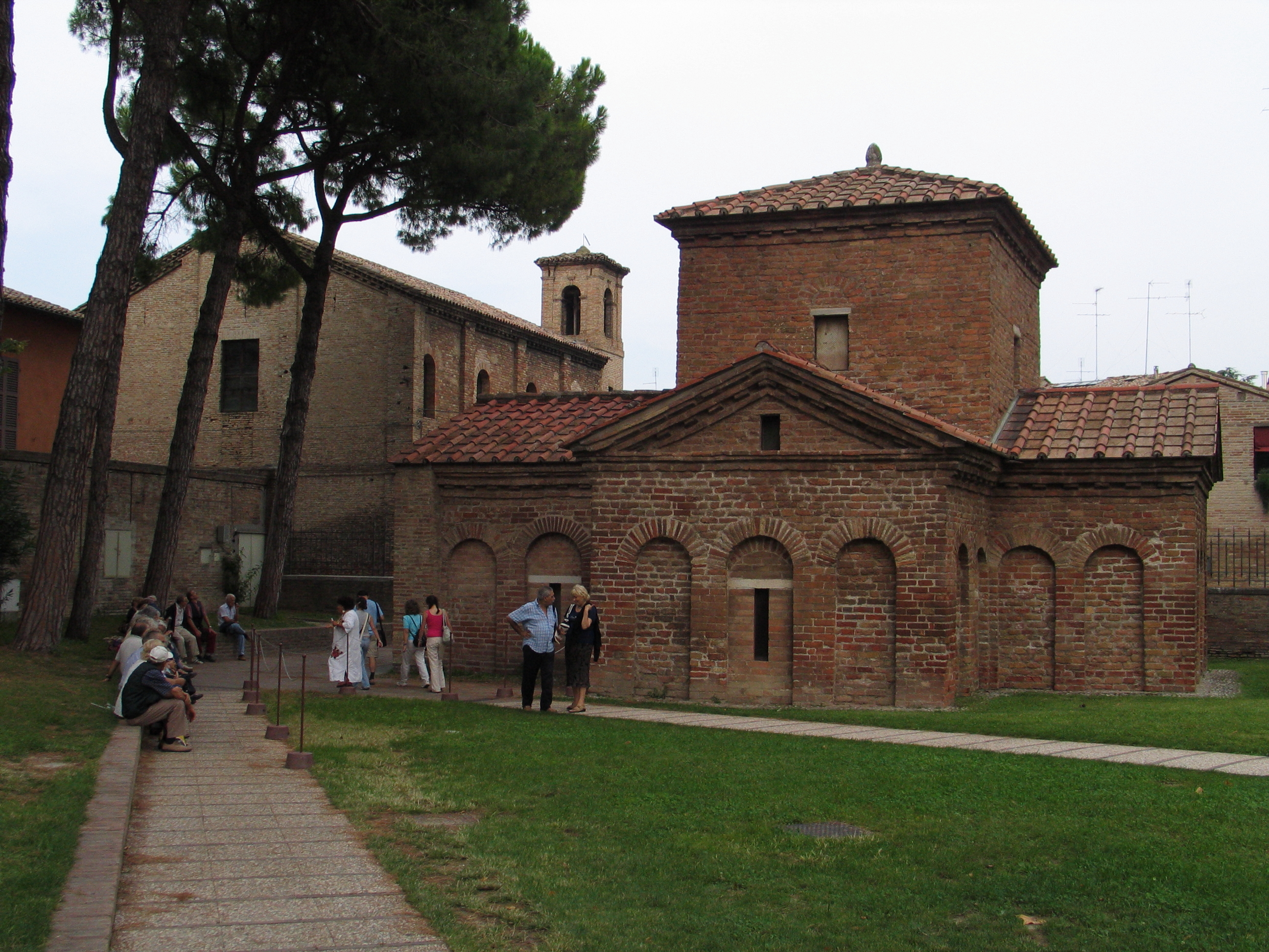 Mausoleum der Galla Placidia in Ravenna, Italien.